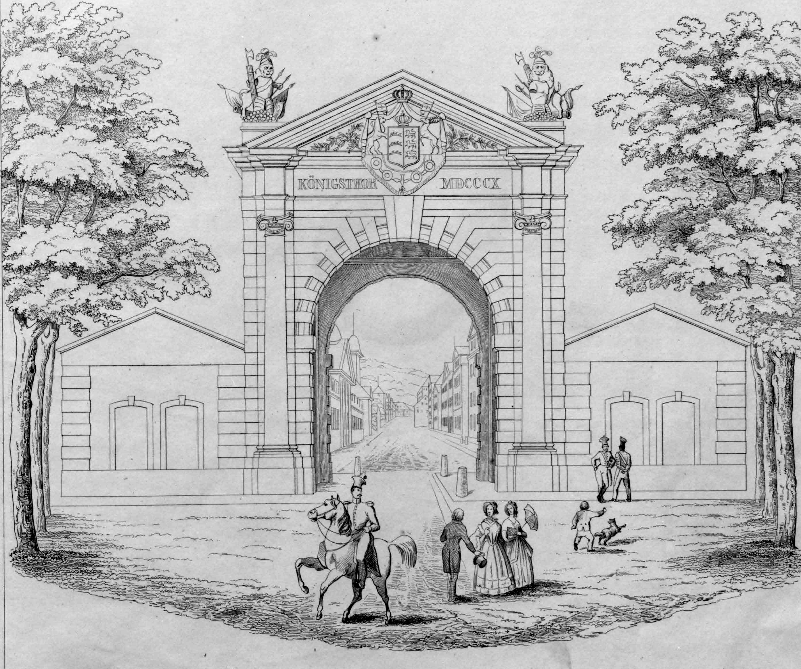 Königstor in Stuttgart, vor 1846.